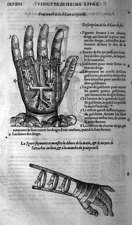 Ambroise Paré (1510?-1590): Les oeuvres d’Ambroise Paré, 1585.